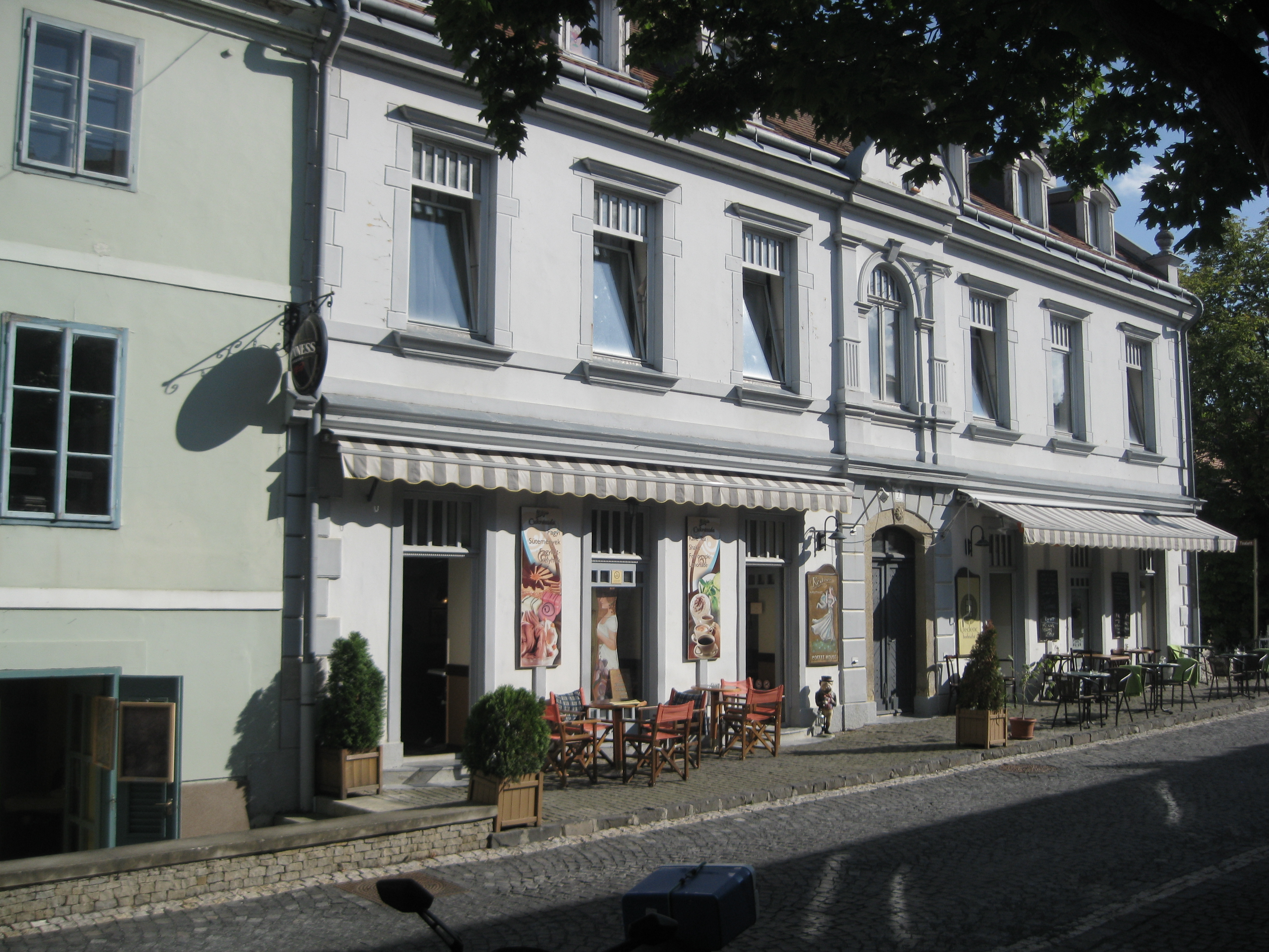 Kedves Kávéház, Balatonfüred, Blaha Lujza u. 7.